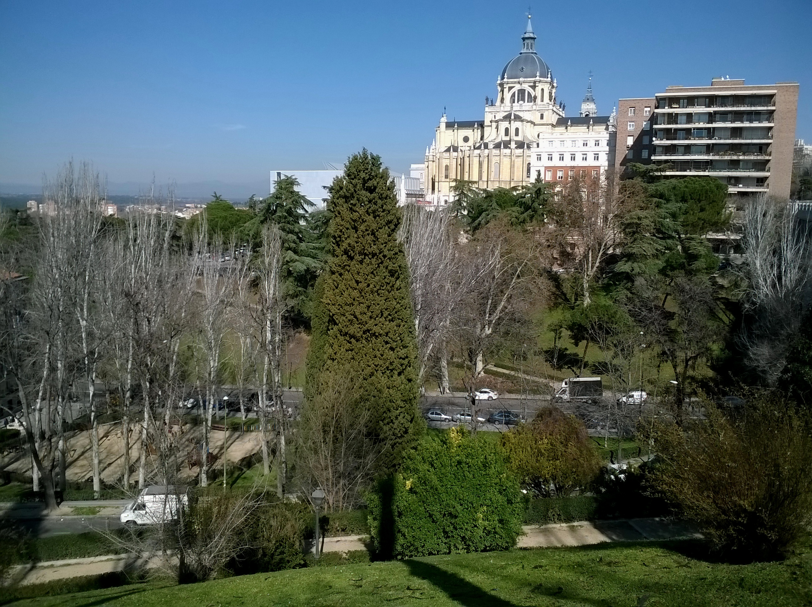 Madrid Jardines De Las Vistillas Vue Iglesia Santa María De La Almudena